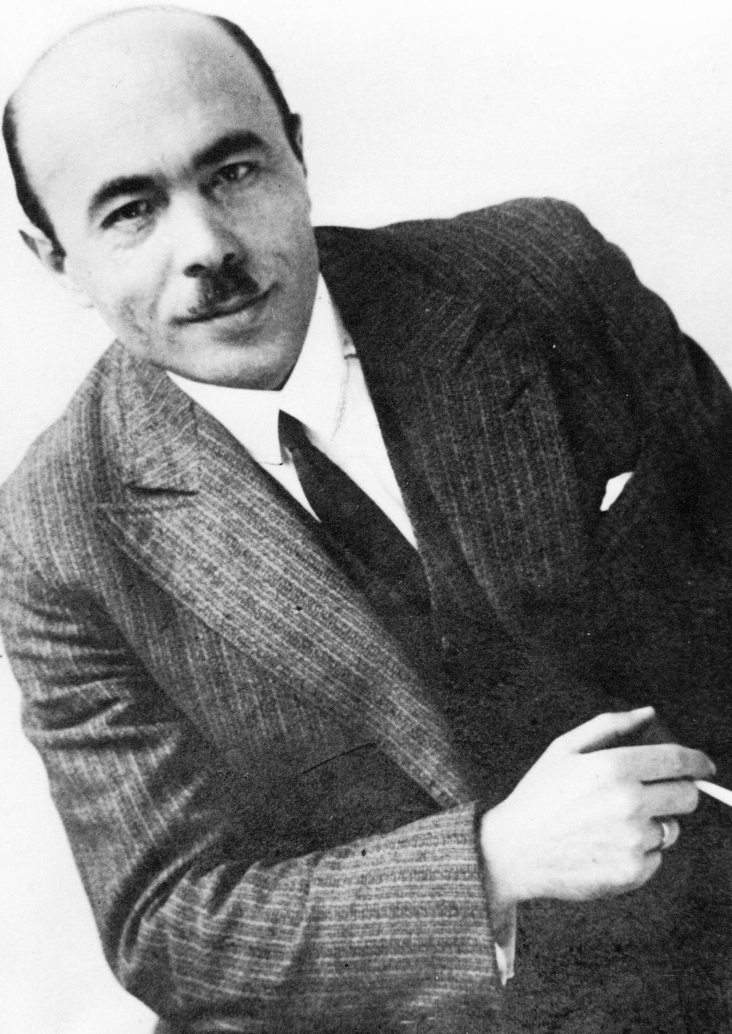 Maian Minich ok. 1938 roku